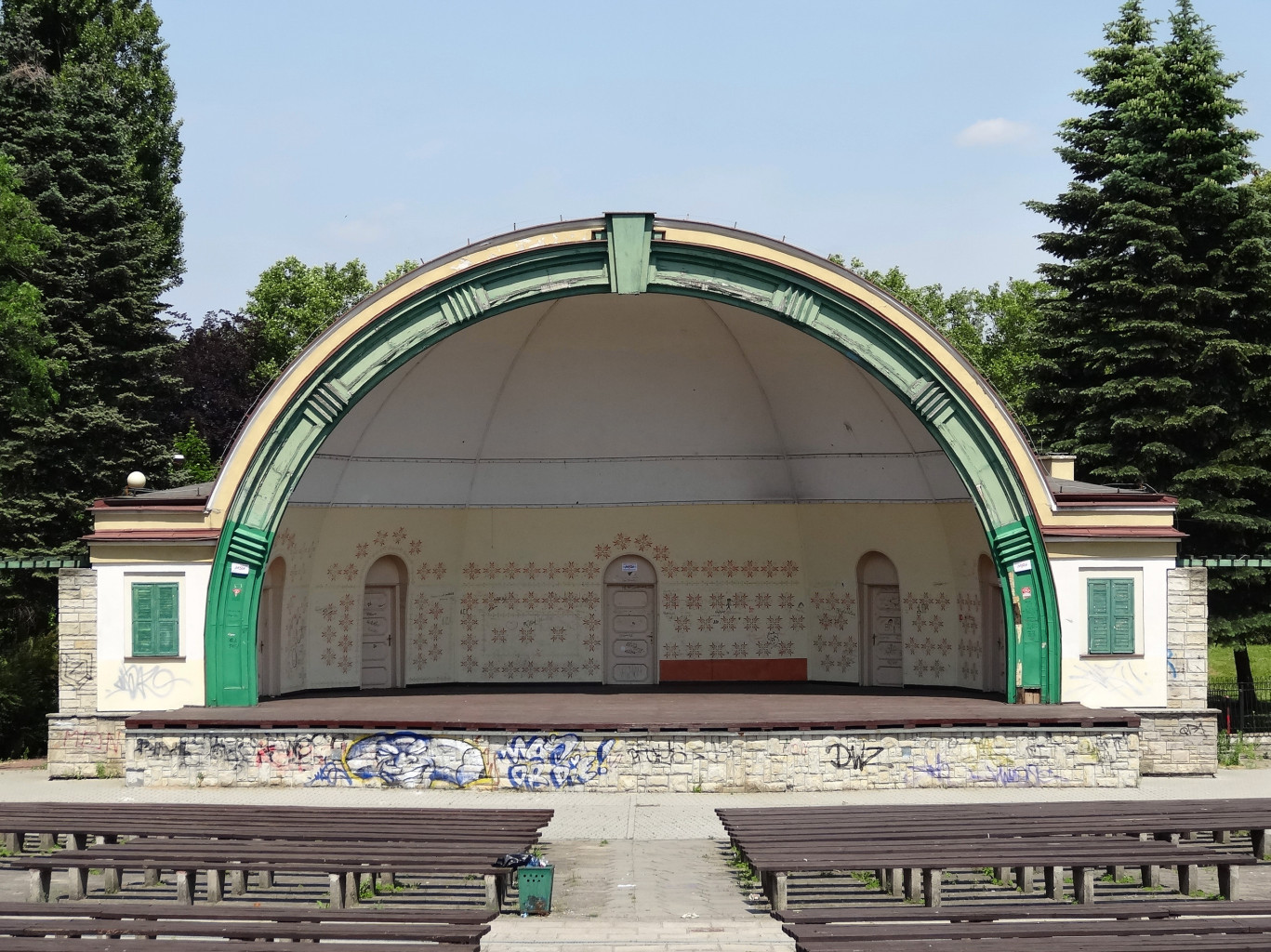 Amfiteatr w parku Ludowym im. Wincentego Witosa w Bydgoszczy